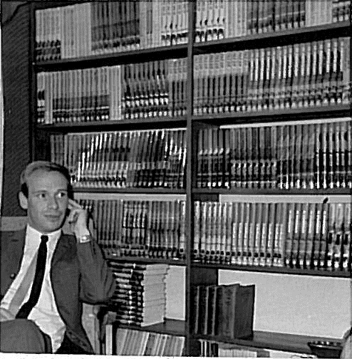 Schrijver Paul Nowee, voor een kast met zijn Arendsoogboeken. 1967